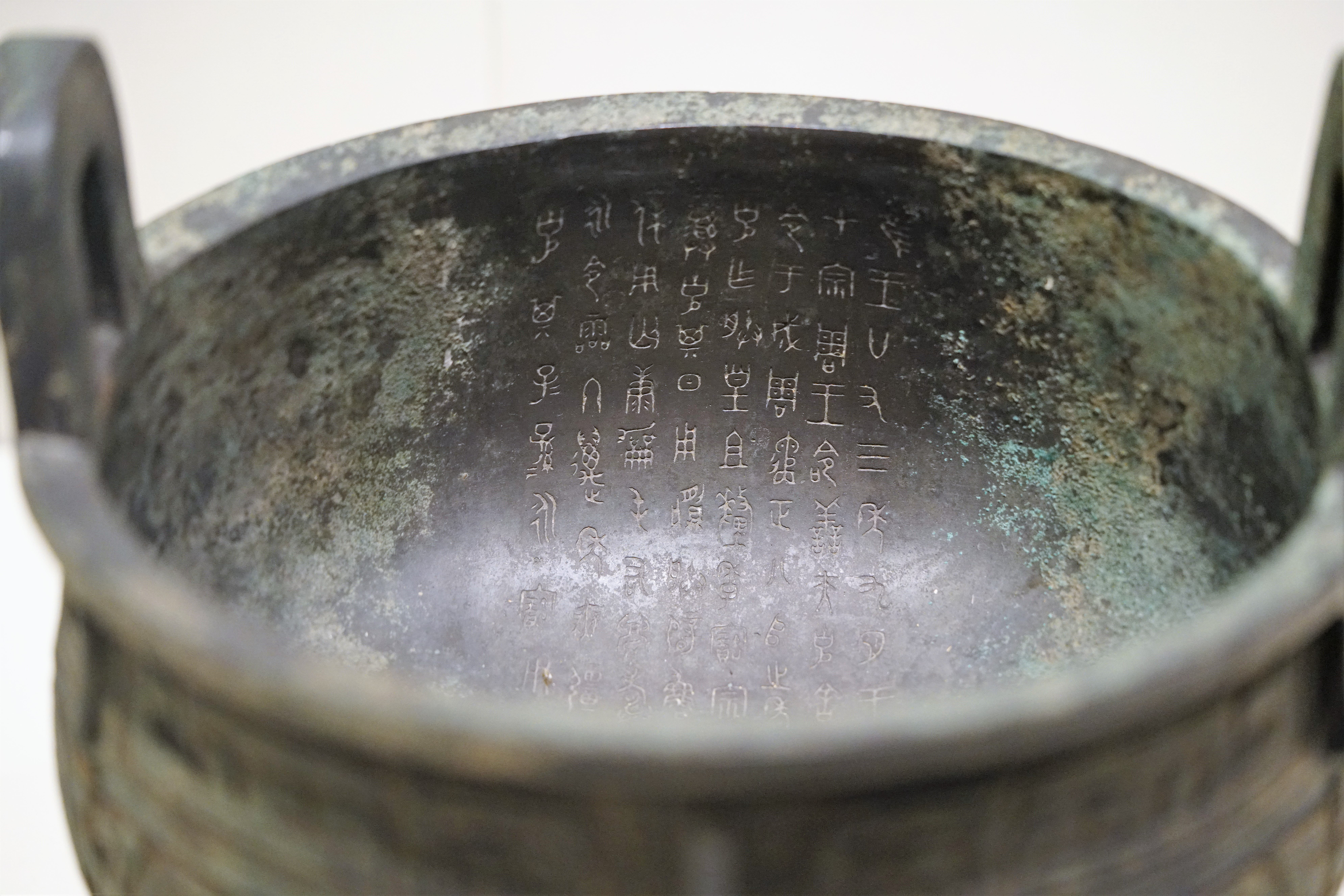 中文（中国大陆）: 西周克鼎 1958年徐世昌孙媳张秉慧捐赠 铭文72字 记叙周厉王二十三年九月，王命兼管军事的膳夫克巡视厉王屯驻成周的军队并进行整饬。